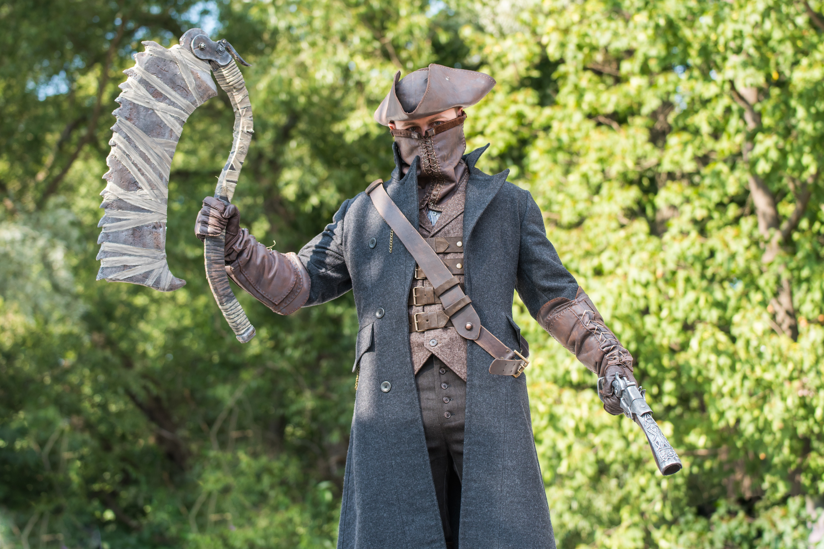 Cosplay Show на Geek Picnic 2018 в Санкт-Петербурге